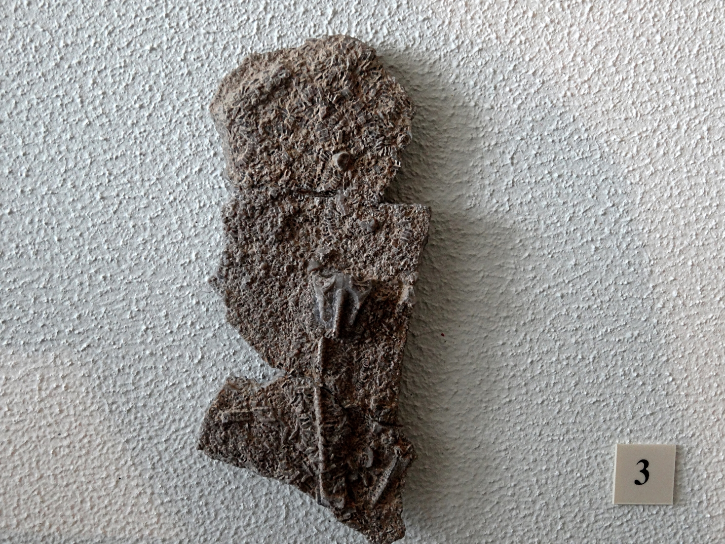 Seelilie Isocrinus basaltiformis, Stiel mit Kelch aus dem Schwarzen Jura der Fränkischen Alb; Fundort nahe Bad Staffelstein /Oberfranken; Exponat in der Petrefaktensammlung Kloster Banz